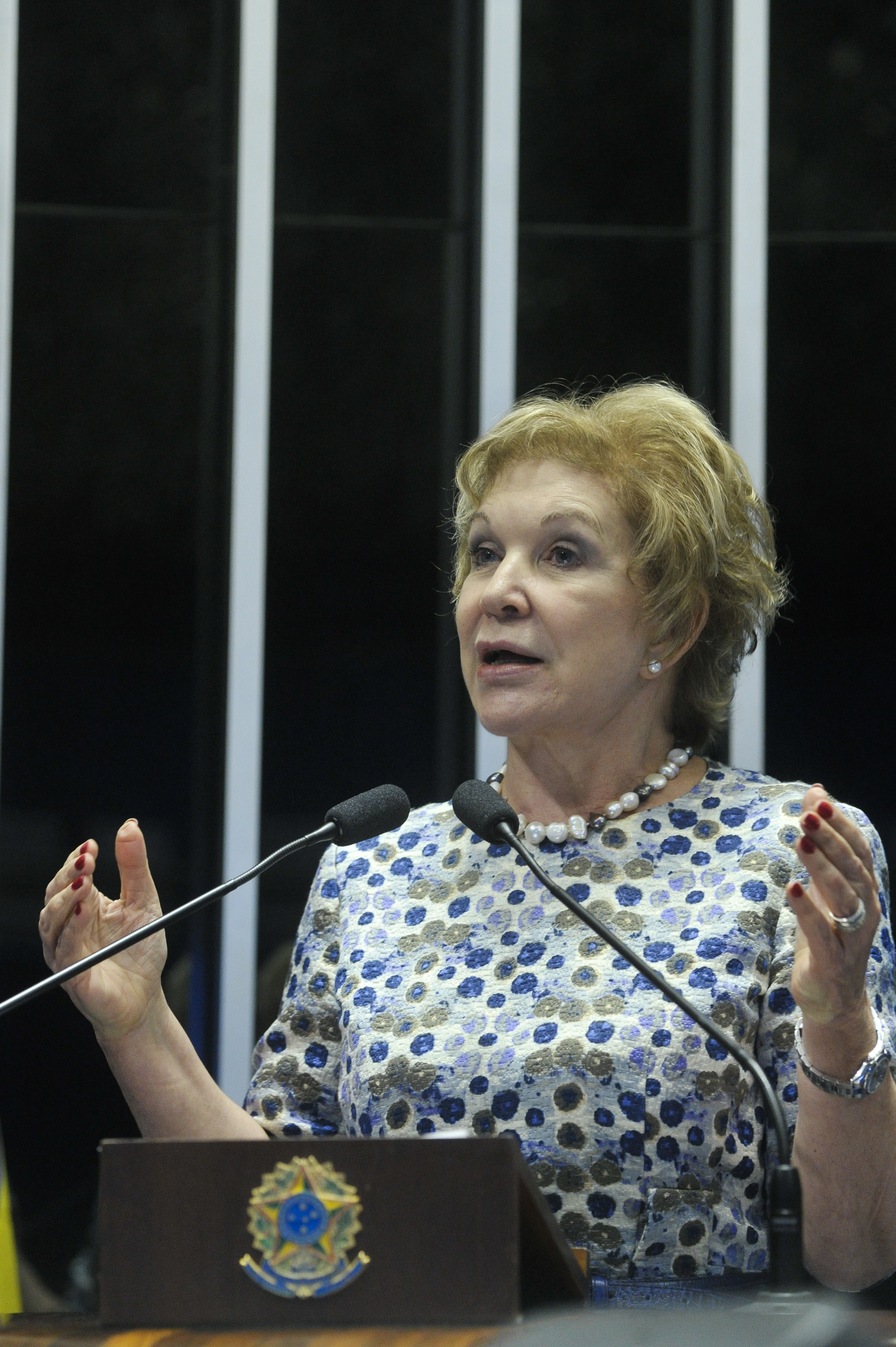 Sessão Solene do Congresso Nacional destinada à comemoração do Dia Internacional da Mulher e à entrega do Diploma Bertha Lutz em sua 15ª Premiação. Em discurso, senadora Marta Suplicy (PMDB-SP). Foto: Geraldo Magela/Agência Senado